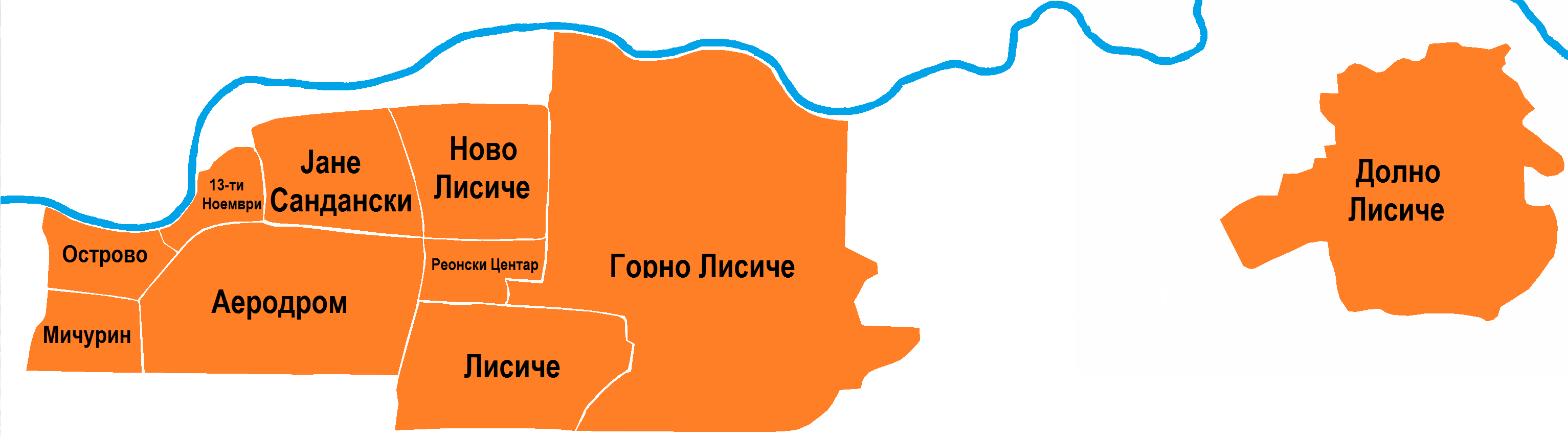 Поделба на општината врз основа на населените места